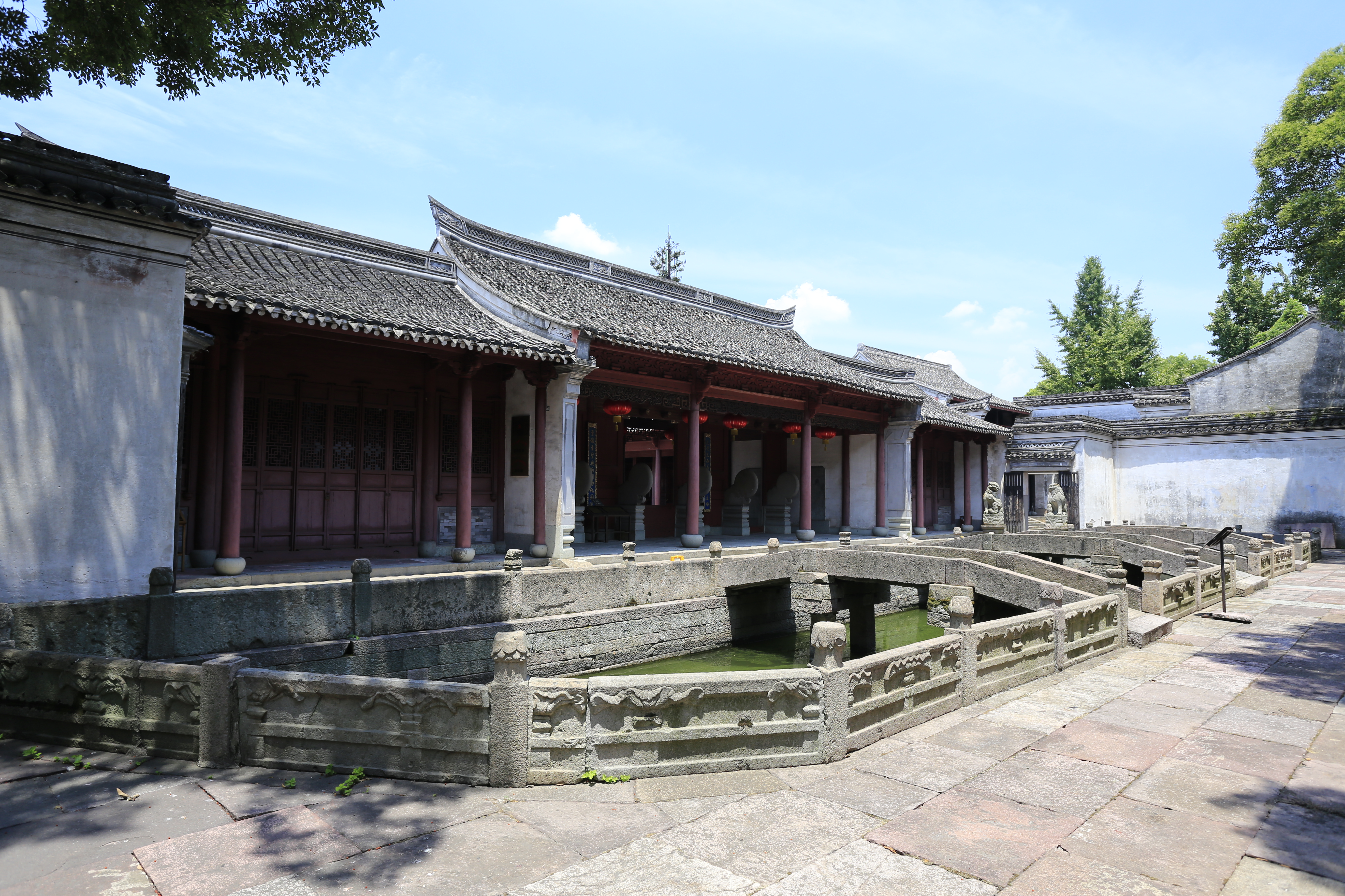 宁波市慈城孔庙 —— 泮池和大成门